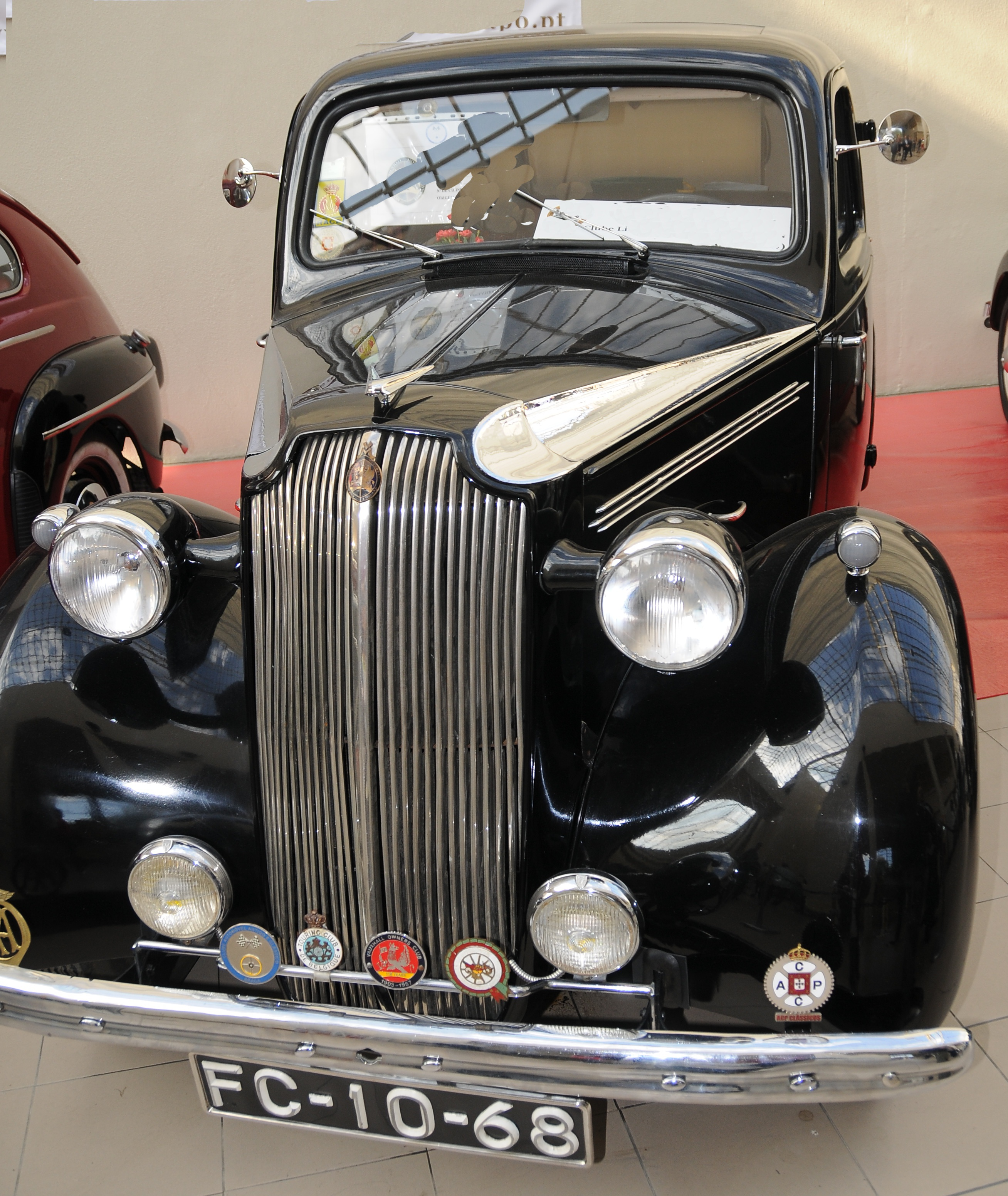 Expomotor in Parque de Exposições de Braga, Portugal